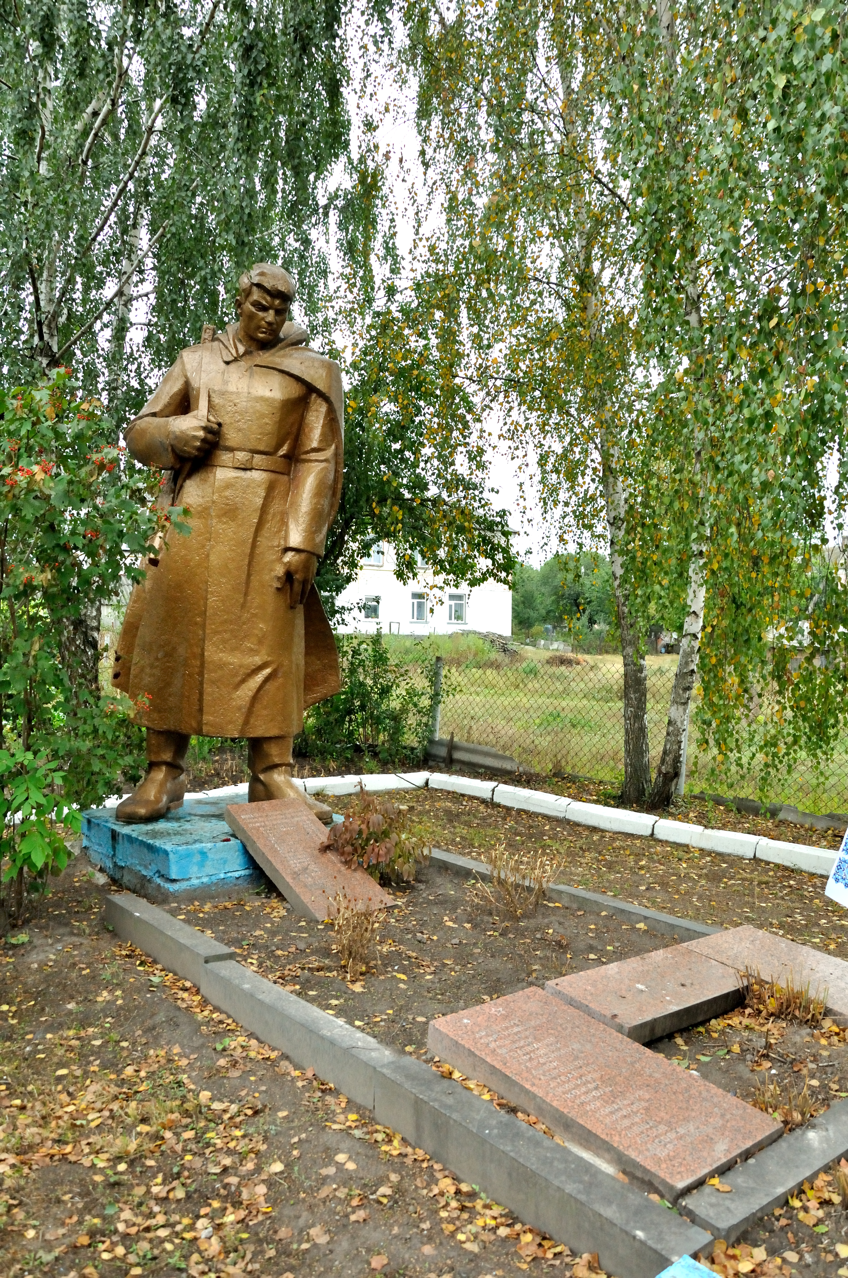 Пам’ятник воїнам-односельчанам, с. Бабин